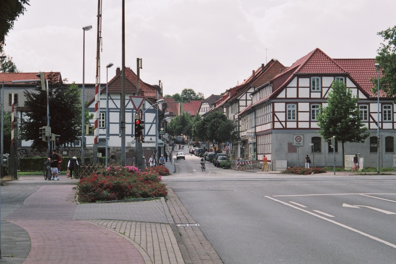 Am Northeimer Mühlentor ist ein Haltepunkt der Südharzstrecke geplant. Im Hintergrund die Fußgängerzone